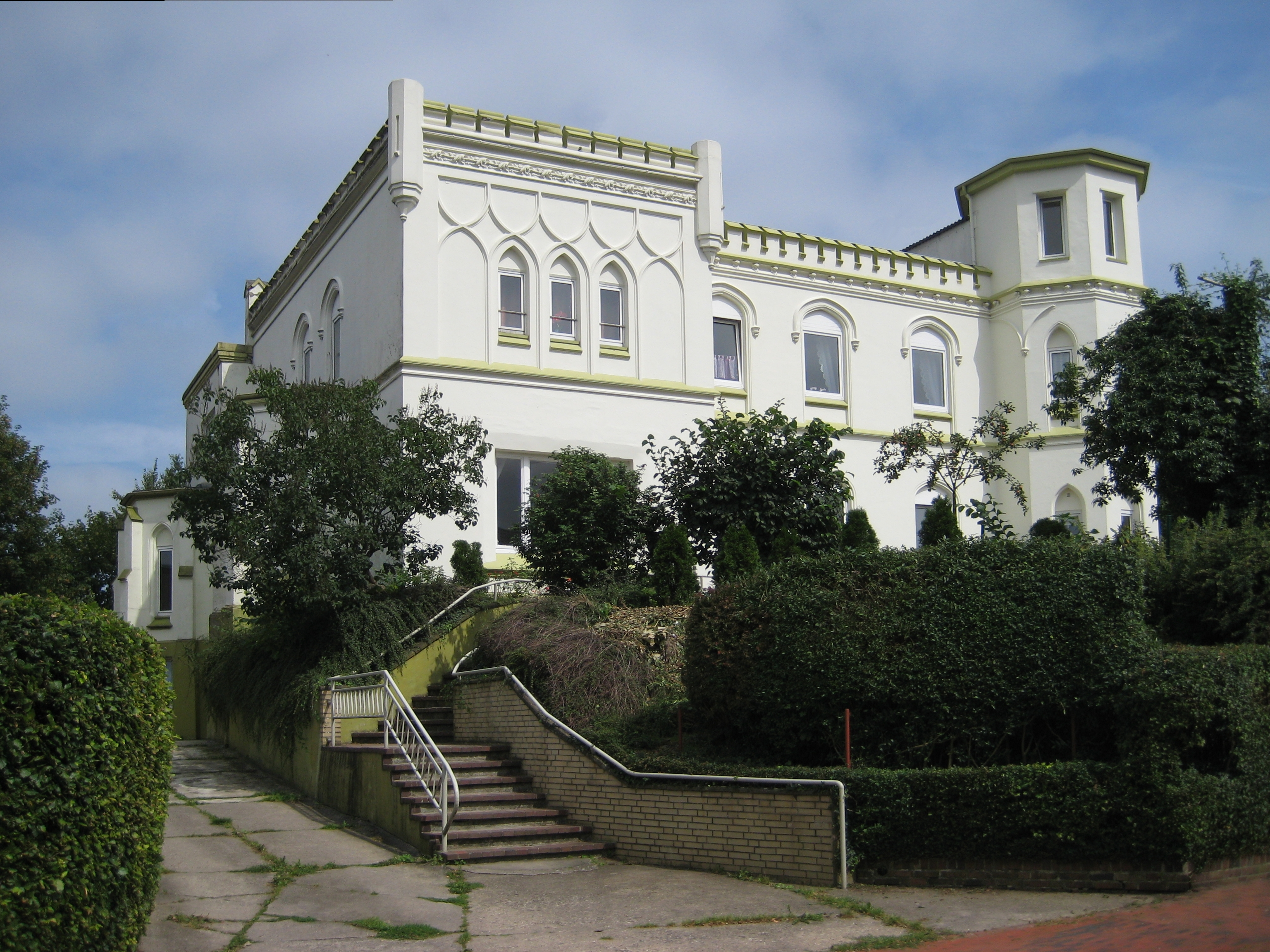 Villa "Wesselburg" in Itzehoe, Breitenburger Straße, erbaut 1873 für den Industriellen Heinrich Wessel